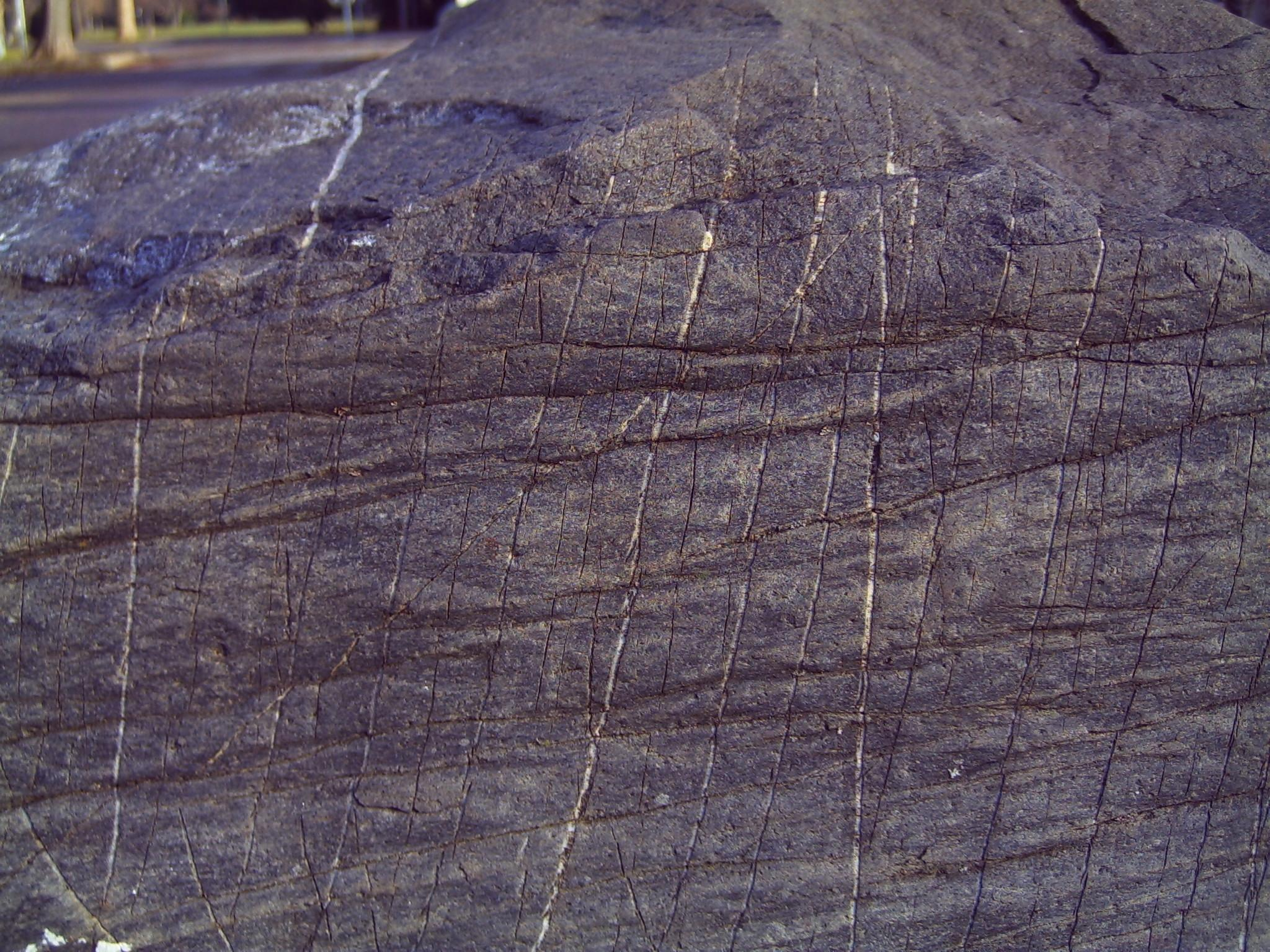 Findling im Mittleren Schlossgarten der Stadt Stuttgart (gegenüber dem Hauptbahnhof). Nahaufnahme der Schlifffläche mit Kritzungen die fast waagerecht verlaufen. Senkrecht sind viele Belastungsrisse zu erkennen.